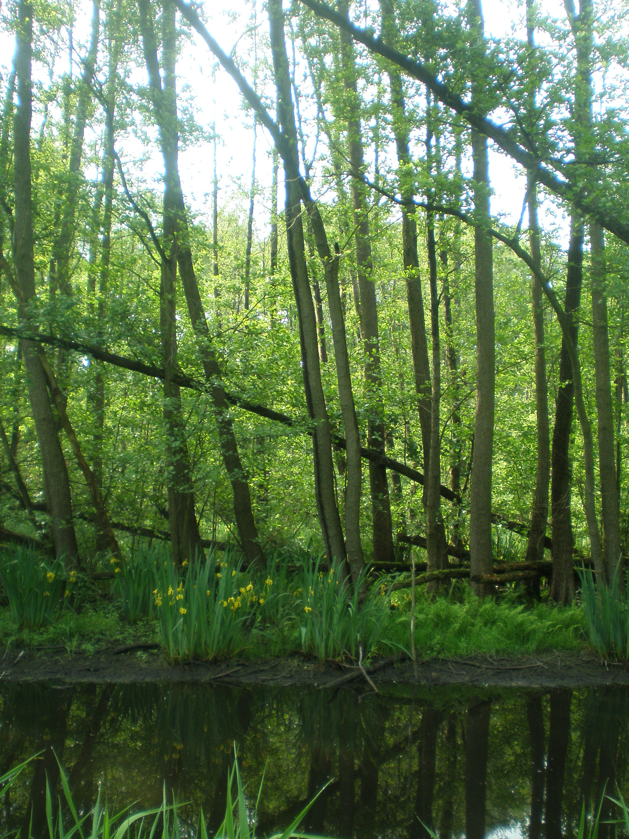 Erlenbruchwald im südlichen Bereich des NSG Kindelsee-Springluch